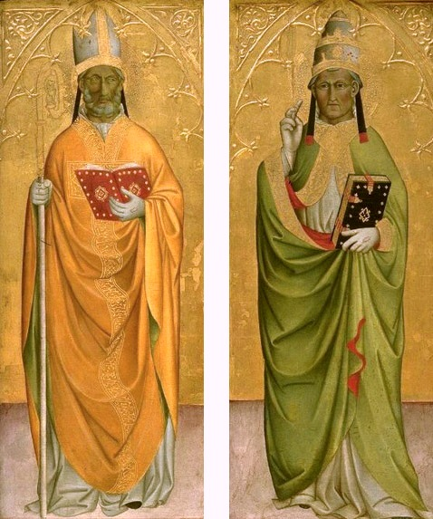 Polyptychon, Altarpiece